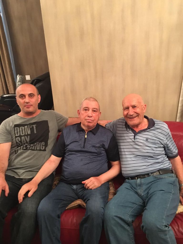 Ələddin müəllim tələbə yoldaşı İsmayıl müəllim və oğlu Zəfər müəllimlə birgə